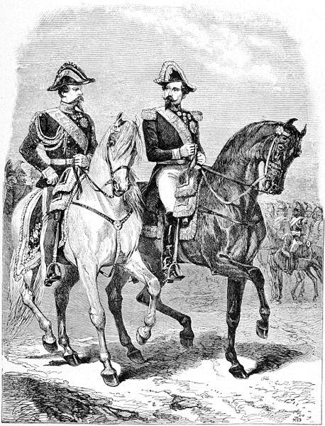 S.M. il Re di Sardegna con l'Imperatore francese Napoleone III